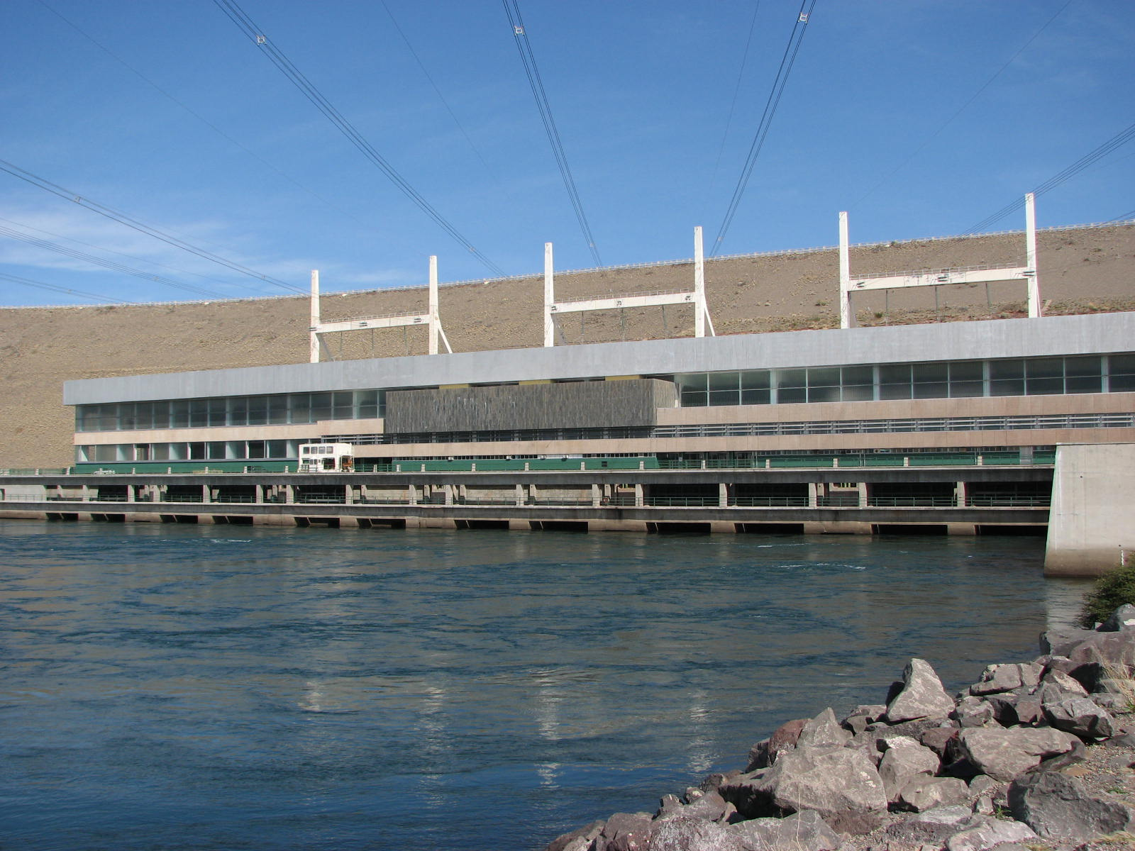 Central Hidroléctrica "El Chocón" - Provincia de Neuquén, Argentina 39°15′57″S 68°45′22″W / 39.26583°S 68.75611°W